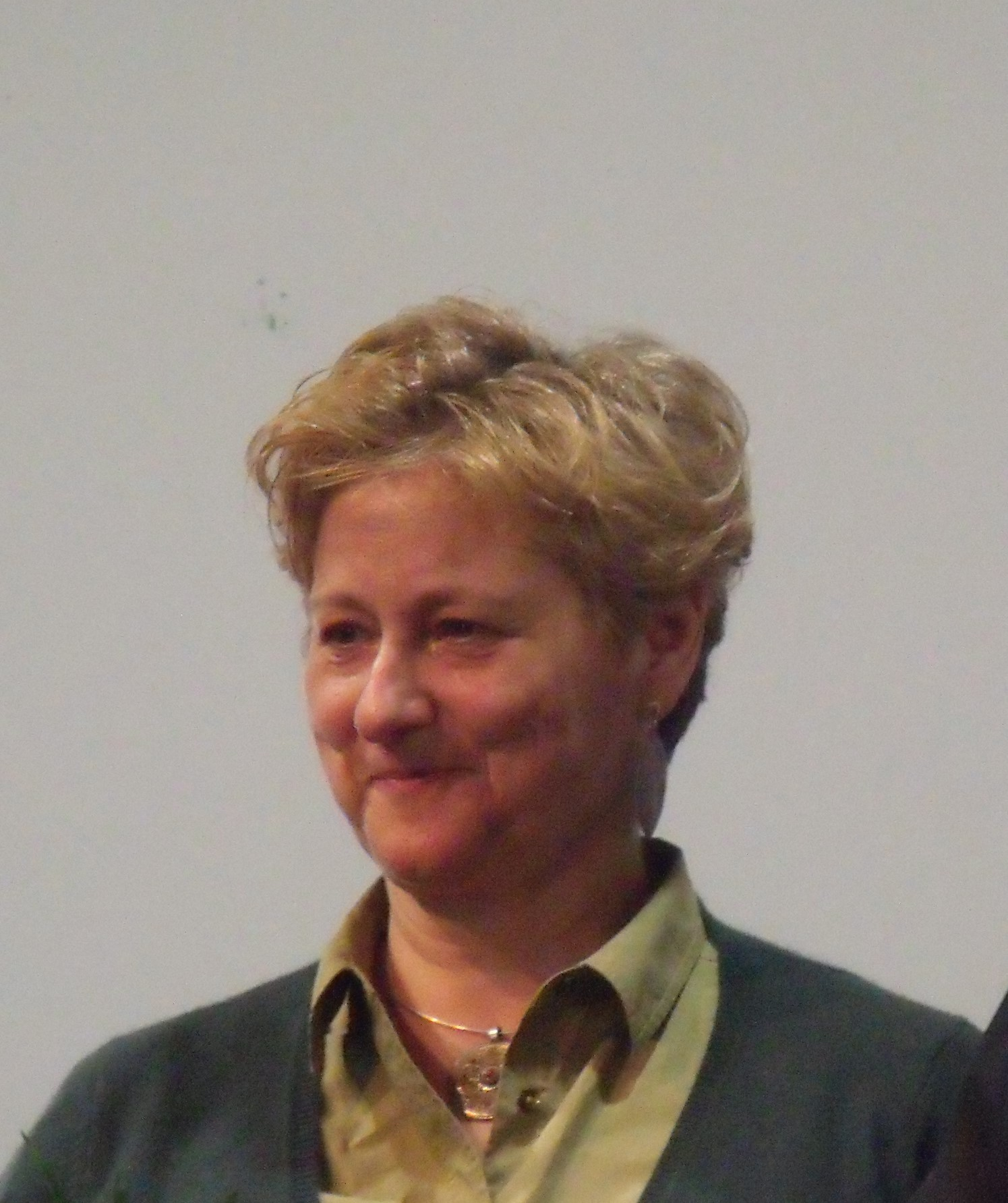 Imagen derivada de otra de la entrega de premios Senca Falls 2016